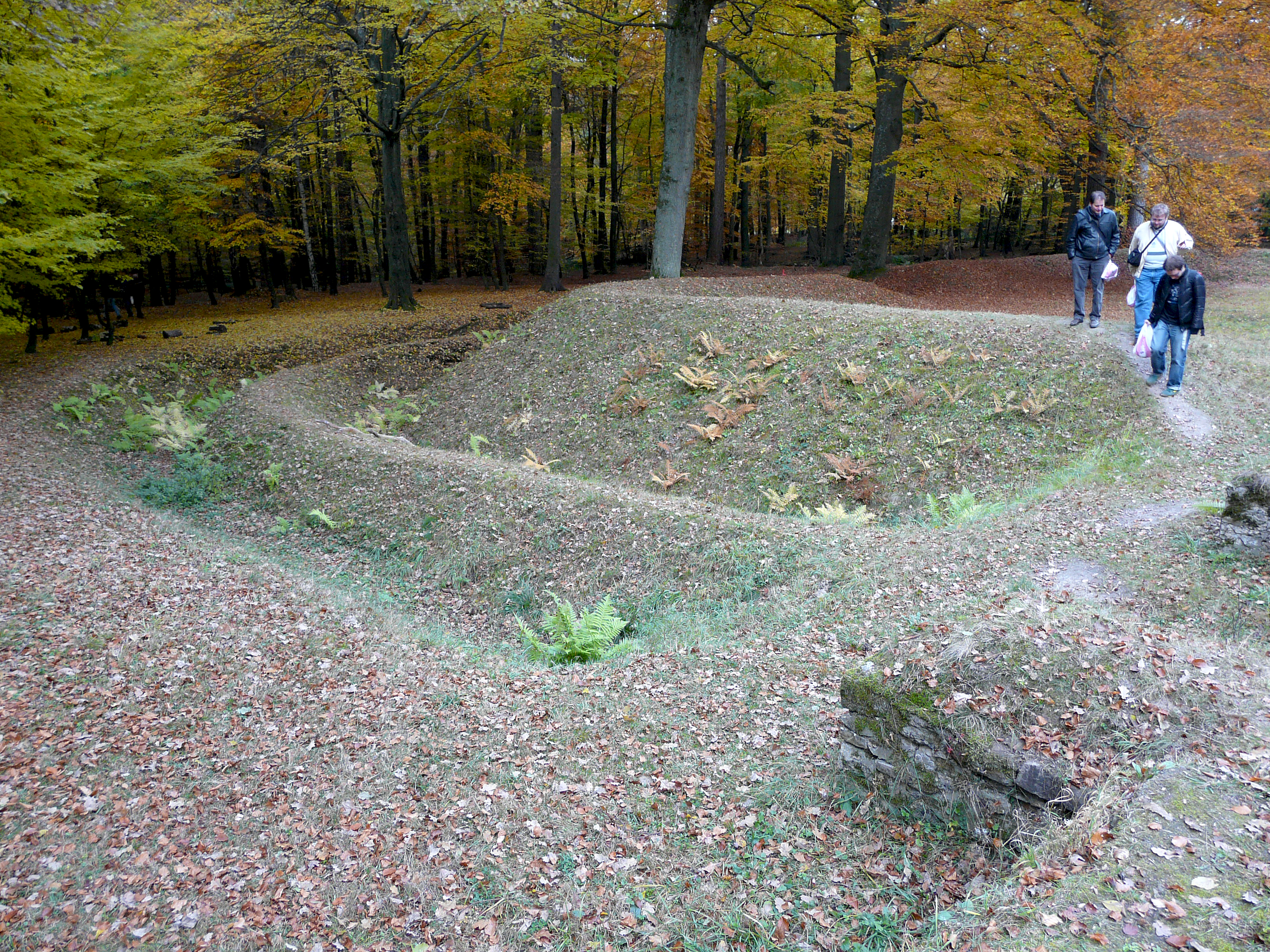 Kastell Saalburg, Nordwestecke der rekonstruierten „Schanze B“